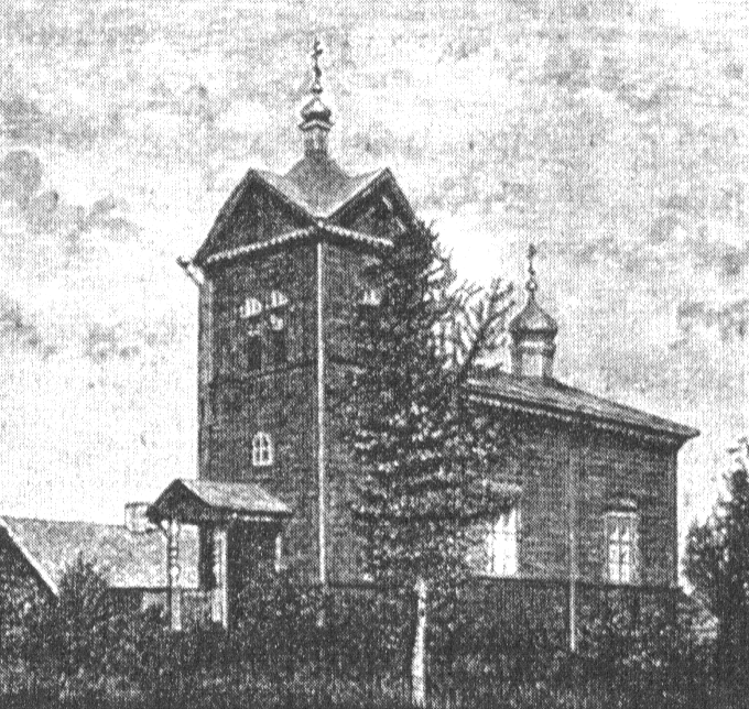 Иллюстрация книги "Православные русские обители" стр.107 илл.1